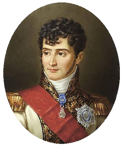 Schilderij van Sophie Lienard (stierf in 1845/ died in 1845) uit het eerste kwart van de 19e eeuw. Bron:artwork [